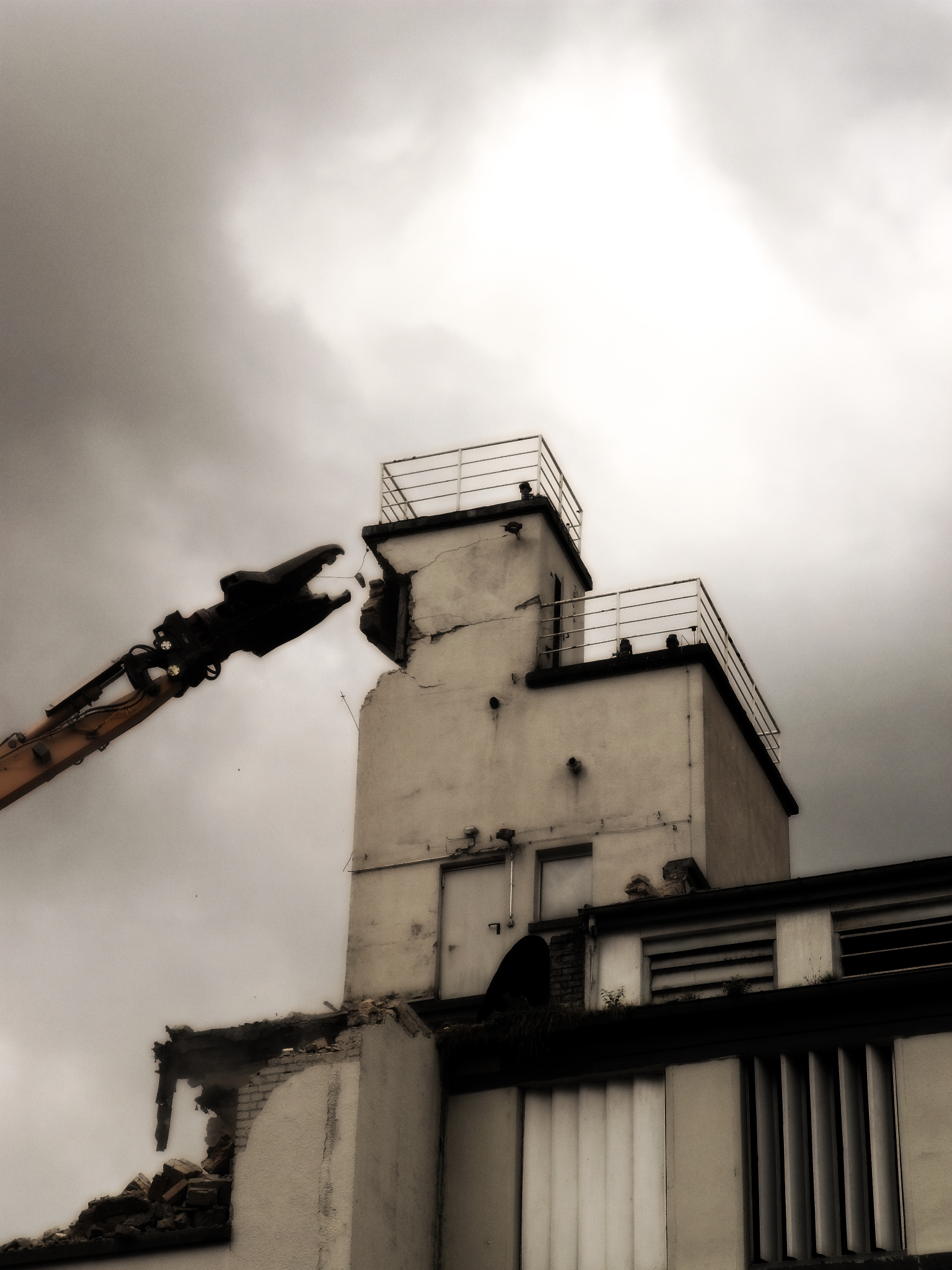 Abriss des Brauturms der Treiberbrauerei